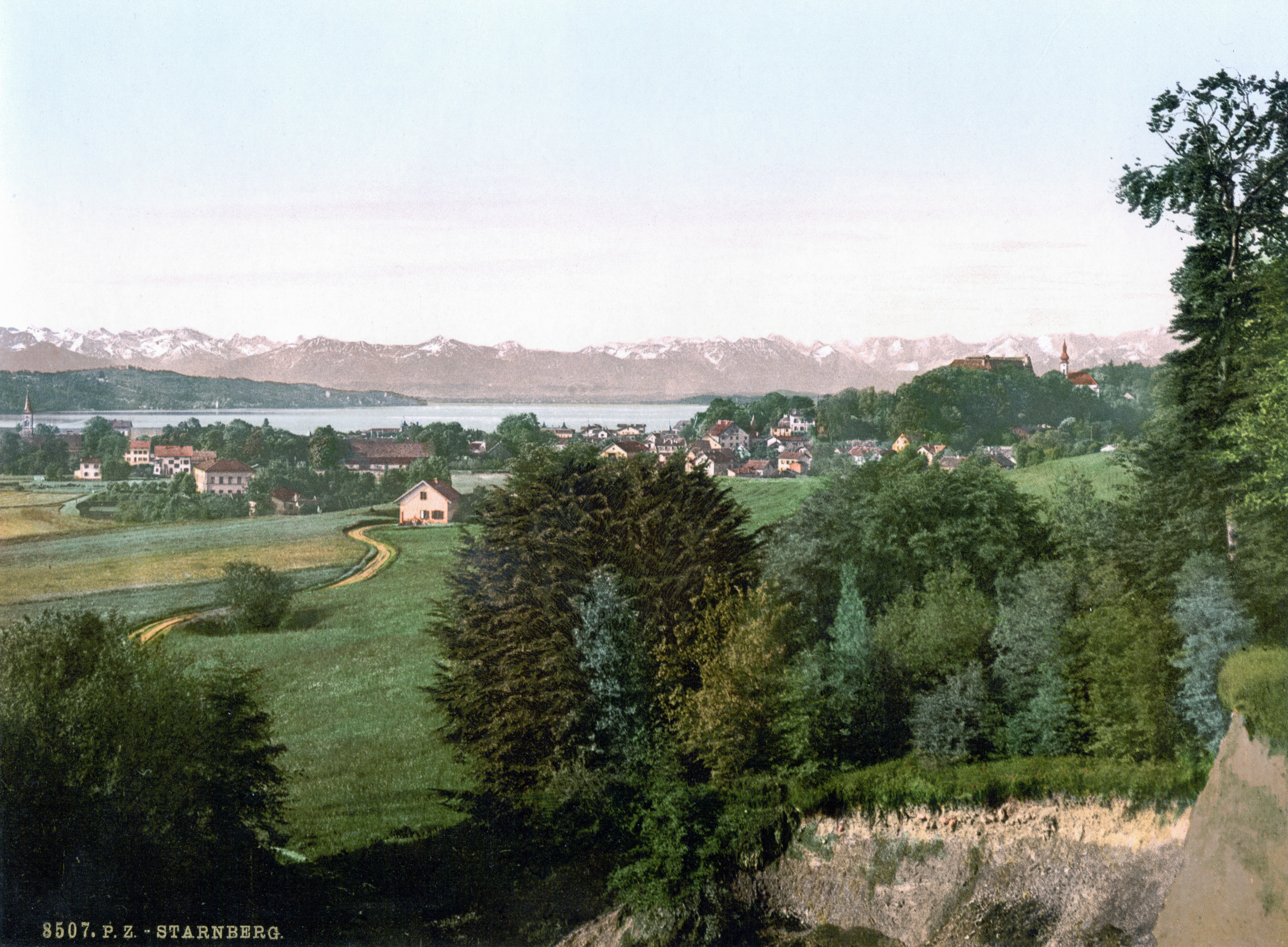 Starnberg